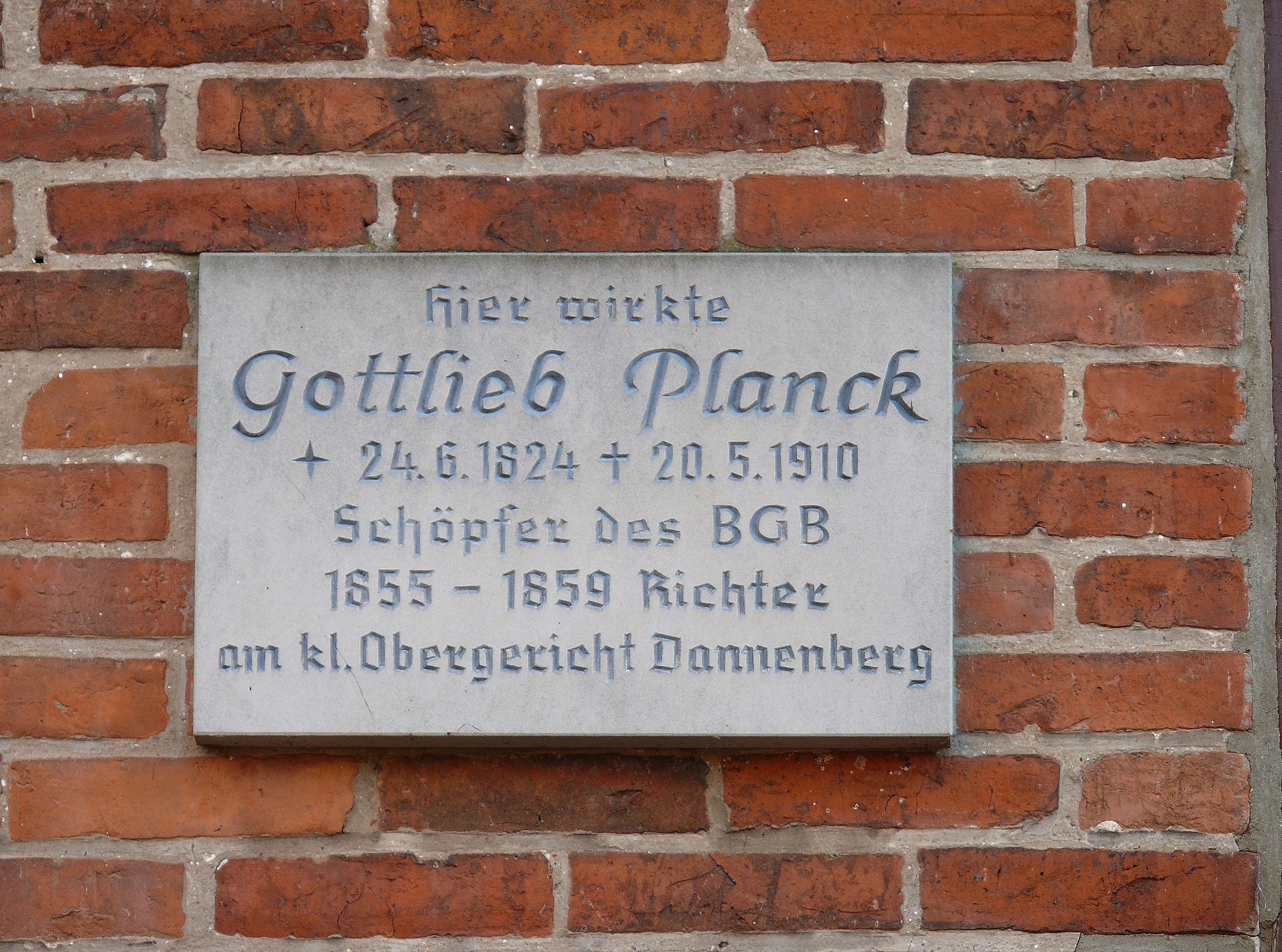 Gedenktafel zu Ehren von Gottlieb Planck am Amtsberg in Dannenberg (Elbe).